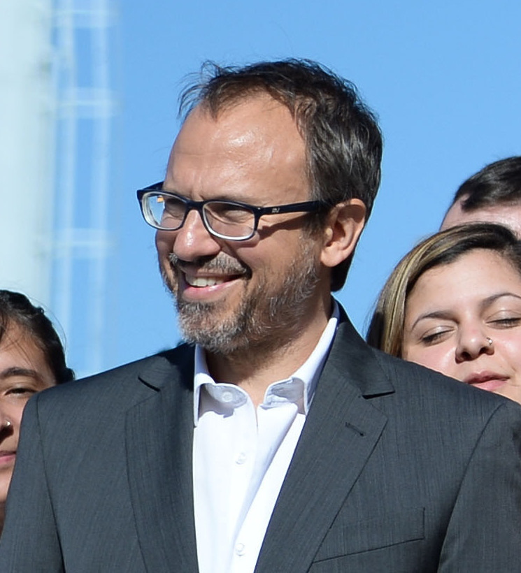 El presidente Mauricio Macri anunció inversiones en la ciudad de Buenos Aires y el conurbano bonaerense por 3500 millones que serán realizadas por la empresa de supermercados Coto.